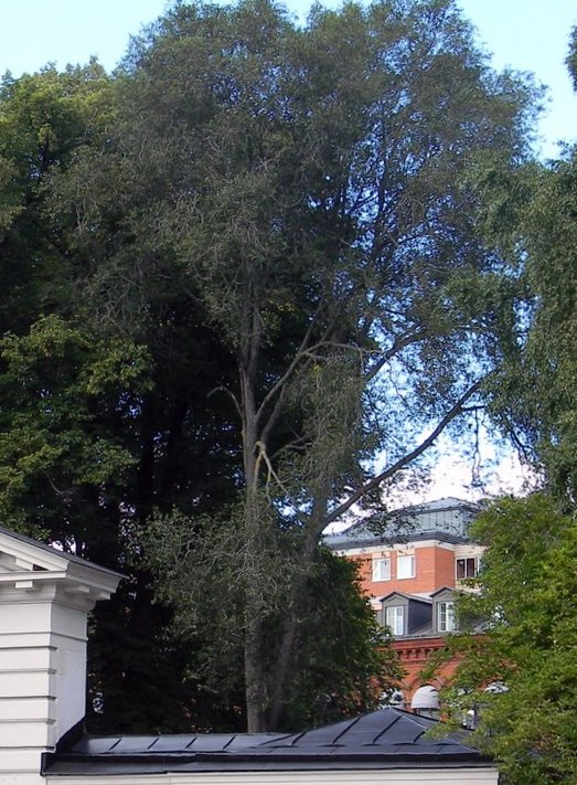 Hantverkargatan